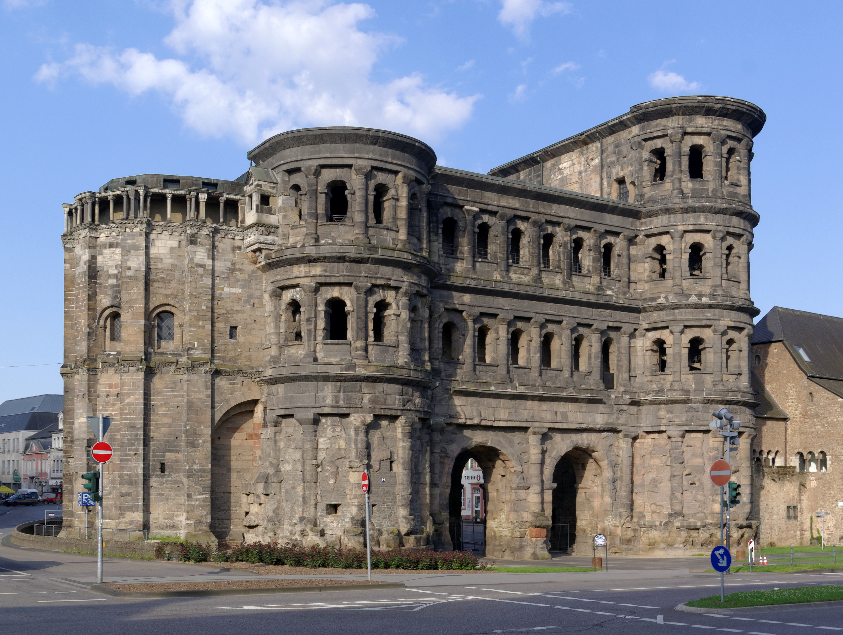 Trier, Porta Nigra und Simeons-Stiftskirche; Nordtor der Stadtbefestigung, größtes Stadttor der antiken Welt; Mittelbau der Toranlage mit Innenhof als Zwinger, zwei Fenstergeschossen und flankierenden Türmen, Sandsteinquaderbau auf Bruchsteinfundament, vor 197; Umwandlung zur Doppelkirche mit nur wenigen Veränderungen, nach 1134, Apsisanbau, steil proportionierter Quaderbau, wohl 1148–53, Rokokodekor um 1750